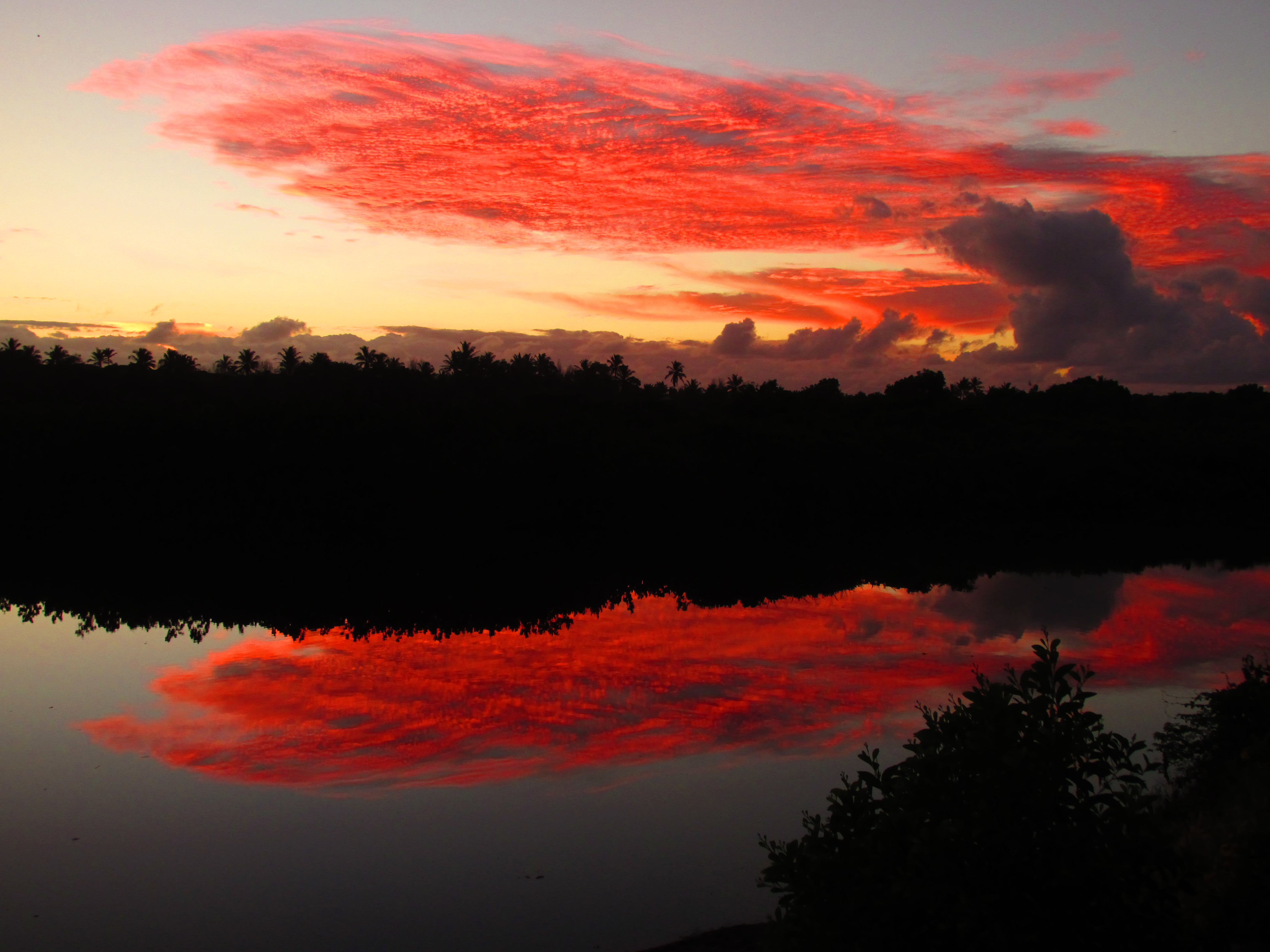 O amanhecer às margens do Rio Itaúnas é repleto de poesia e magnetismo, atributos inerentes à essa região privilegiada do Espírito Santo.